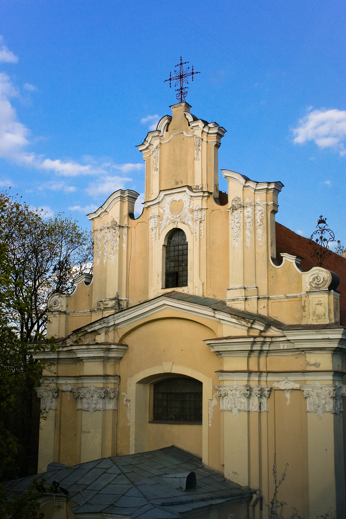 St George's Church in Vilnius